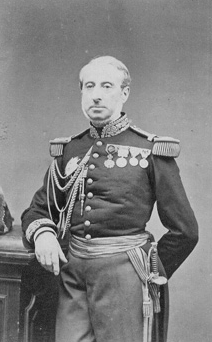 French admiral Edmond Jurien de La Gravière (1812-1892)